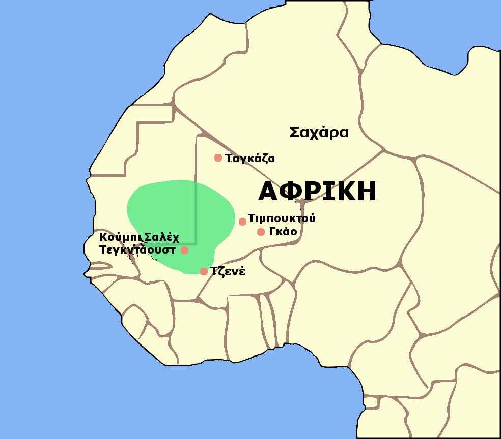 Η Αυτοκρατορία Γκάνα στην μεγαλύτερη έκτασή της